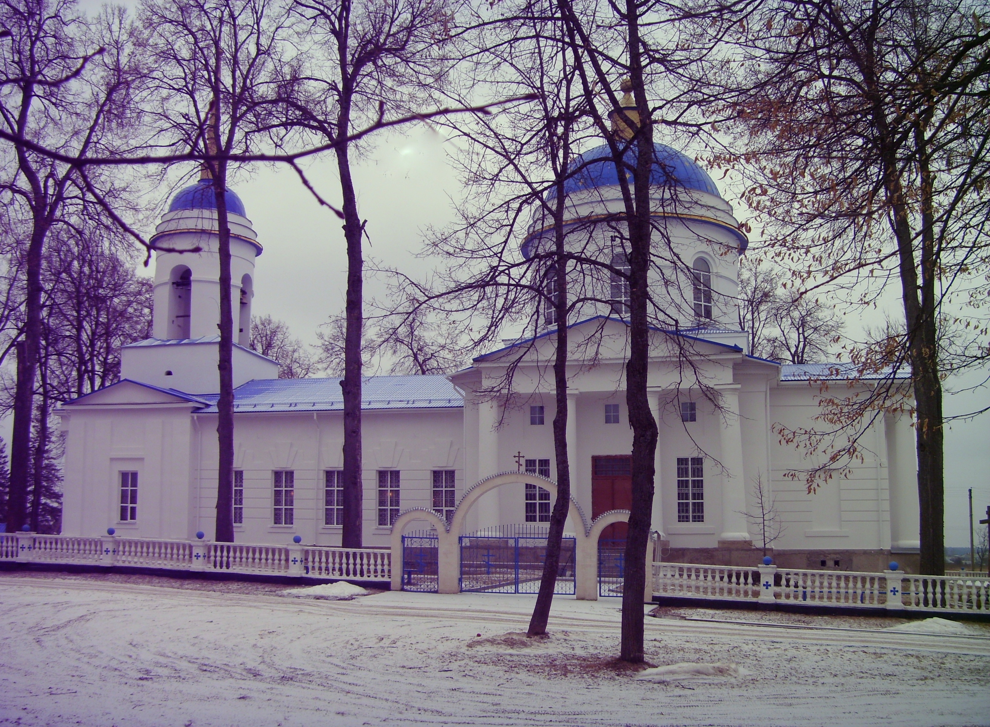 Покровская церковь (Брянская область, Дятьково, р. п. Бытошь)